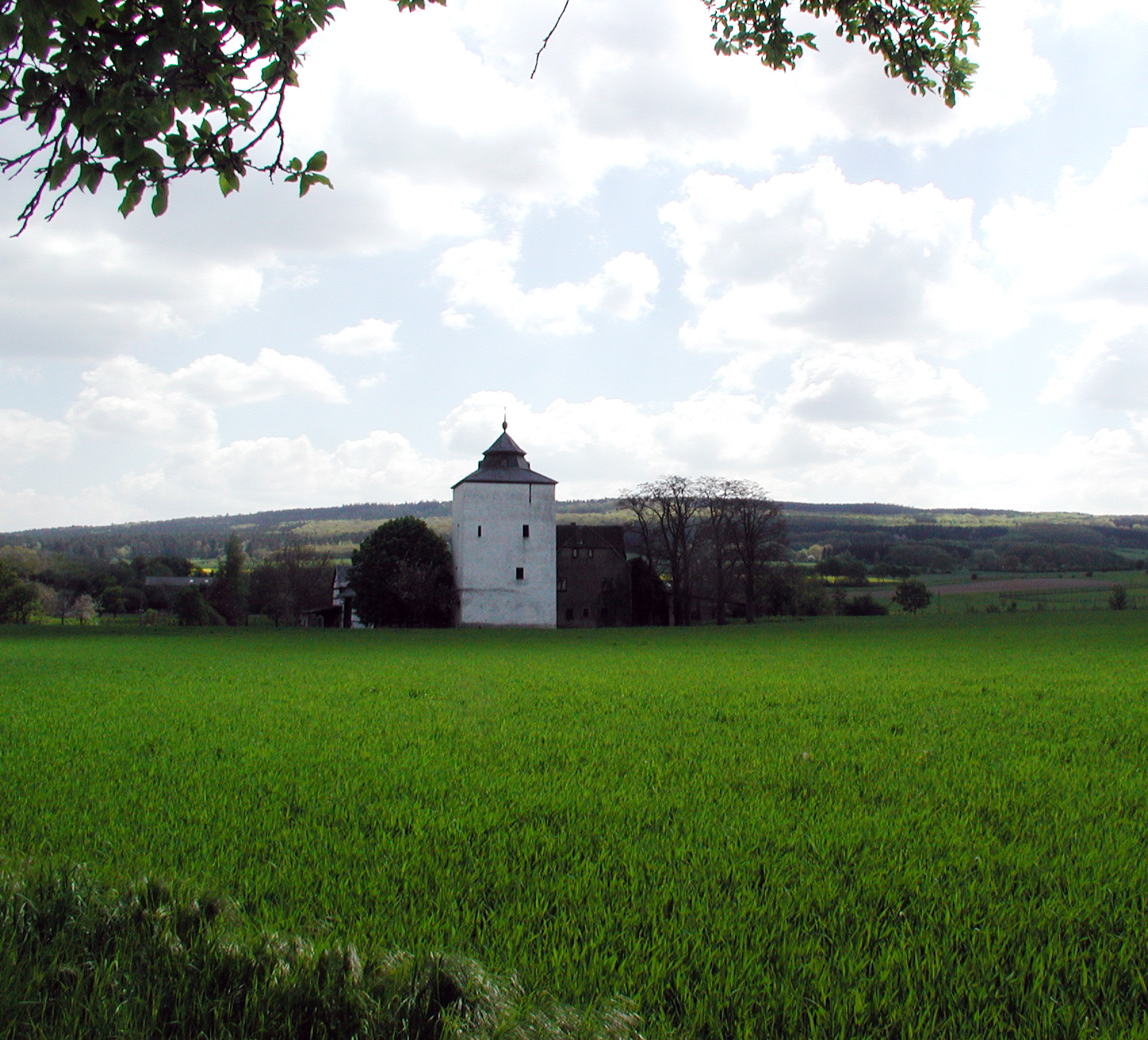 Bad Münstereifel Arloff. Burg Arloff